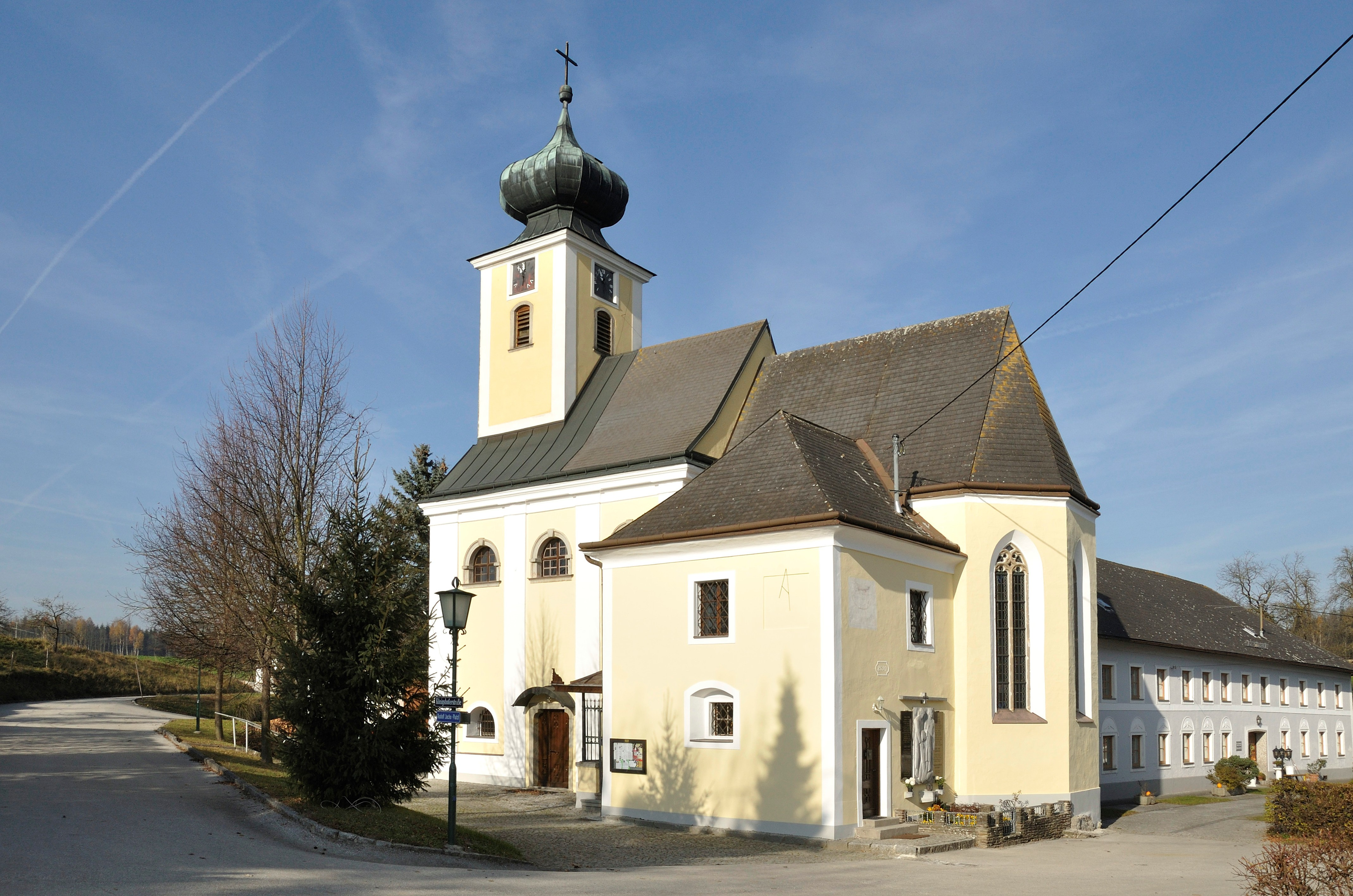 Kath. Pfarrkirche Maria Laah